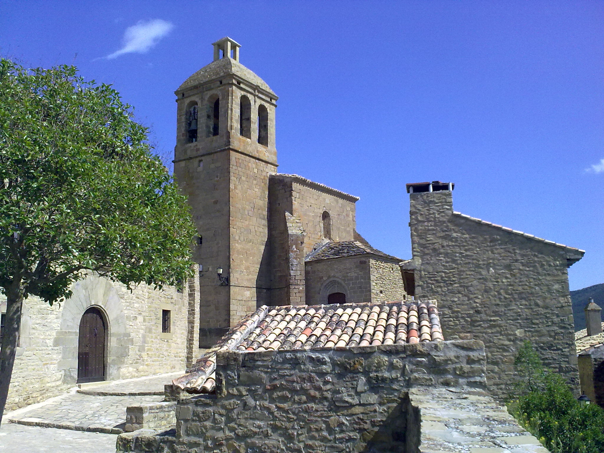 Pintano le 23 mai 2010.